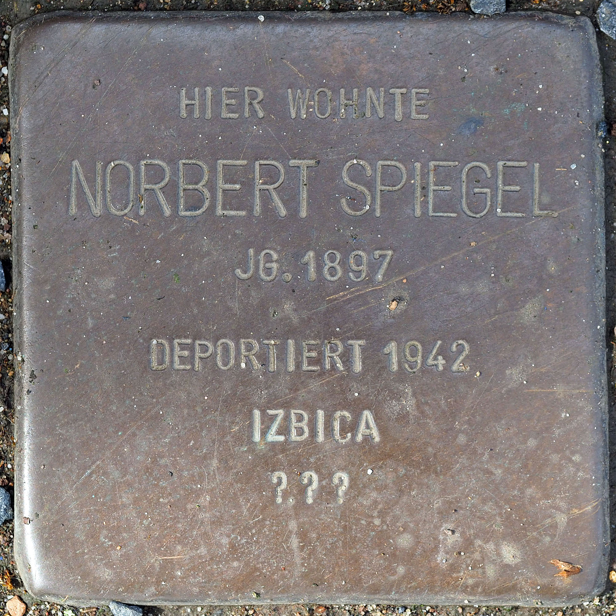 Stolpersteine MG: Spiegel, Norbert